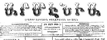 Արմենիա